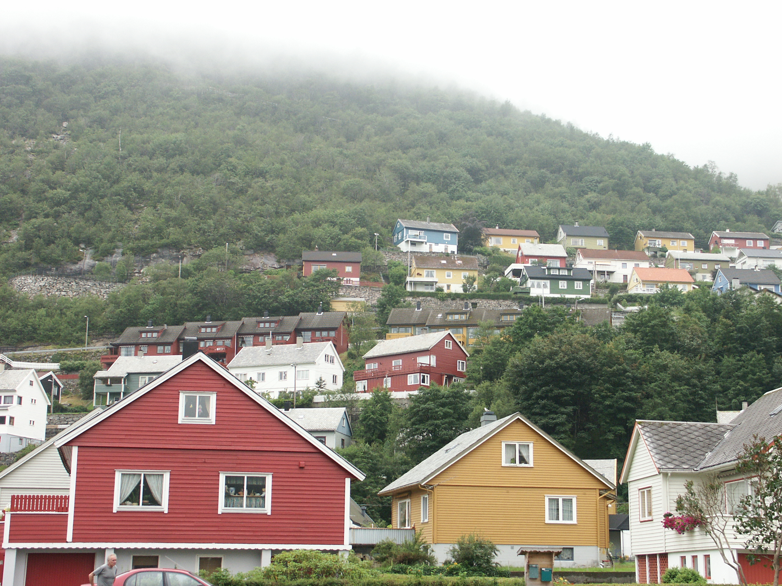 Frå Høyanger